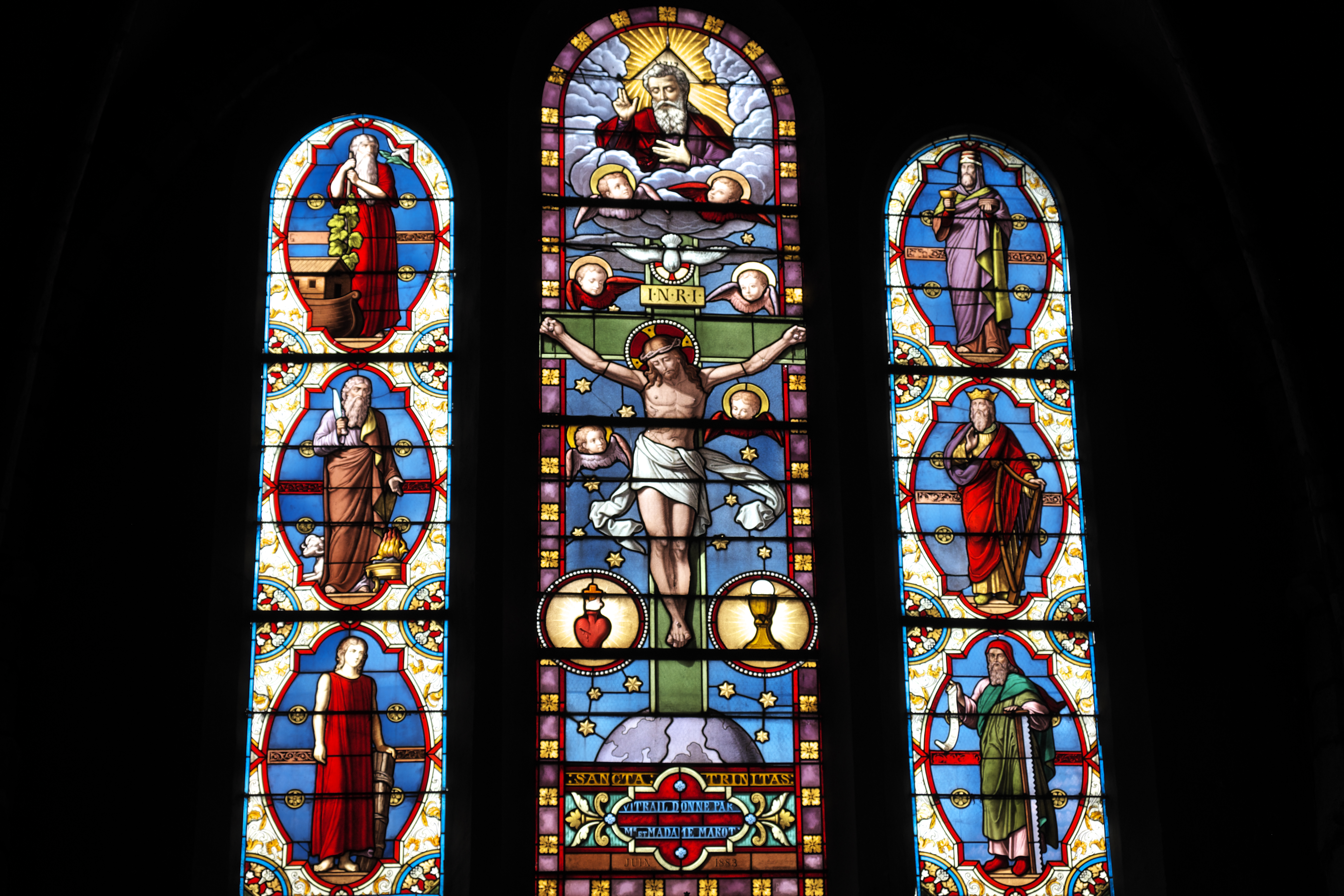 Katholische Kirche Saint-Pierre-Saint-Eutrope in Angerville im Département Essonne (Île-de-France/Frankreich), Bleiglasfenster